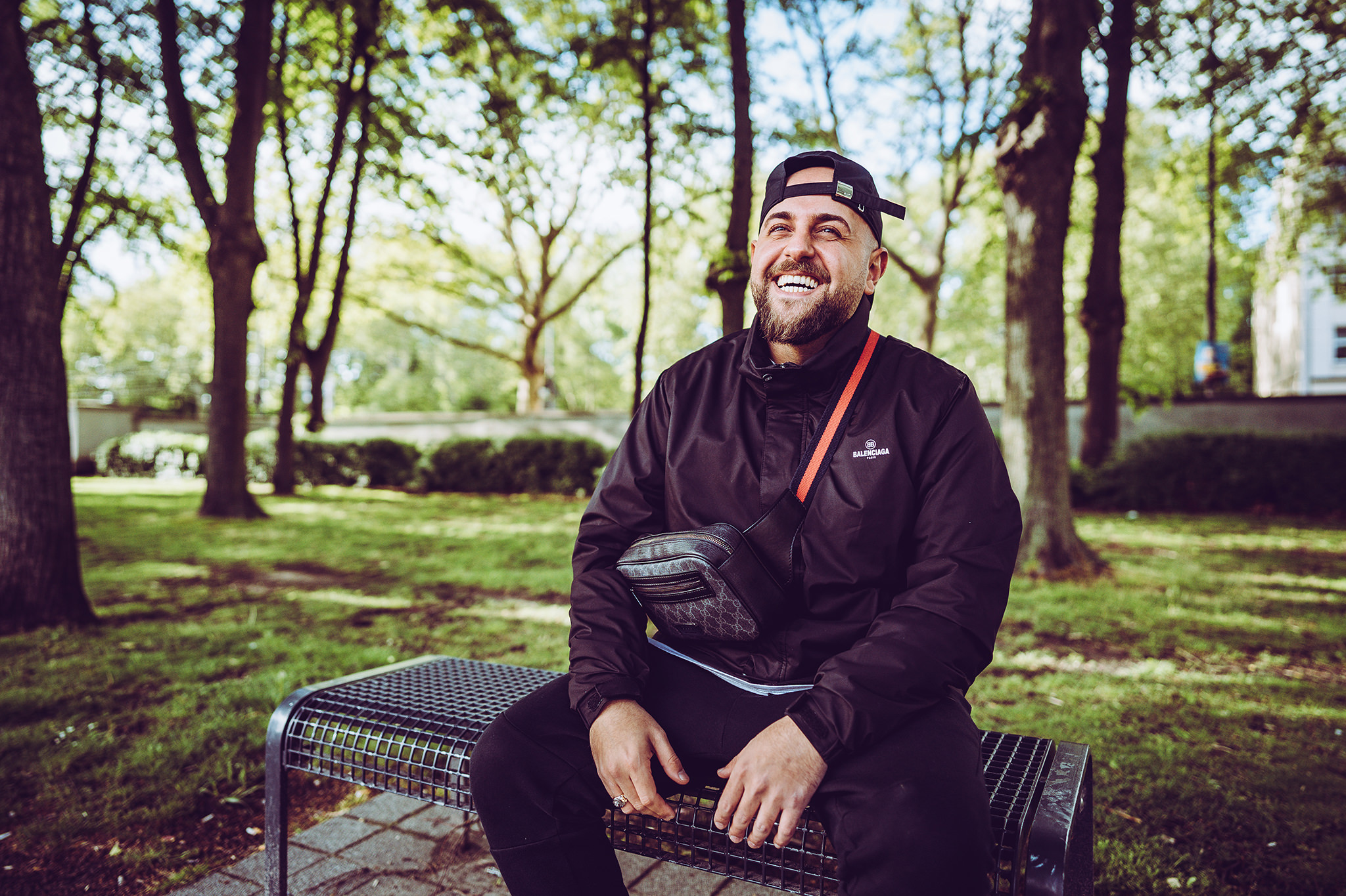 Pressefoto des Rappers EZY